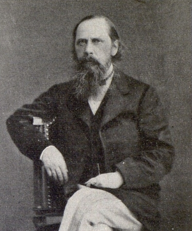 Saltykov-Schedrin (1826-1889)